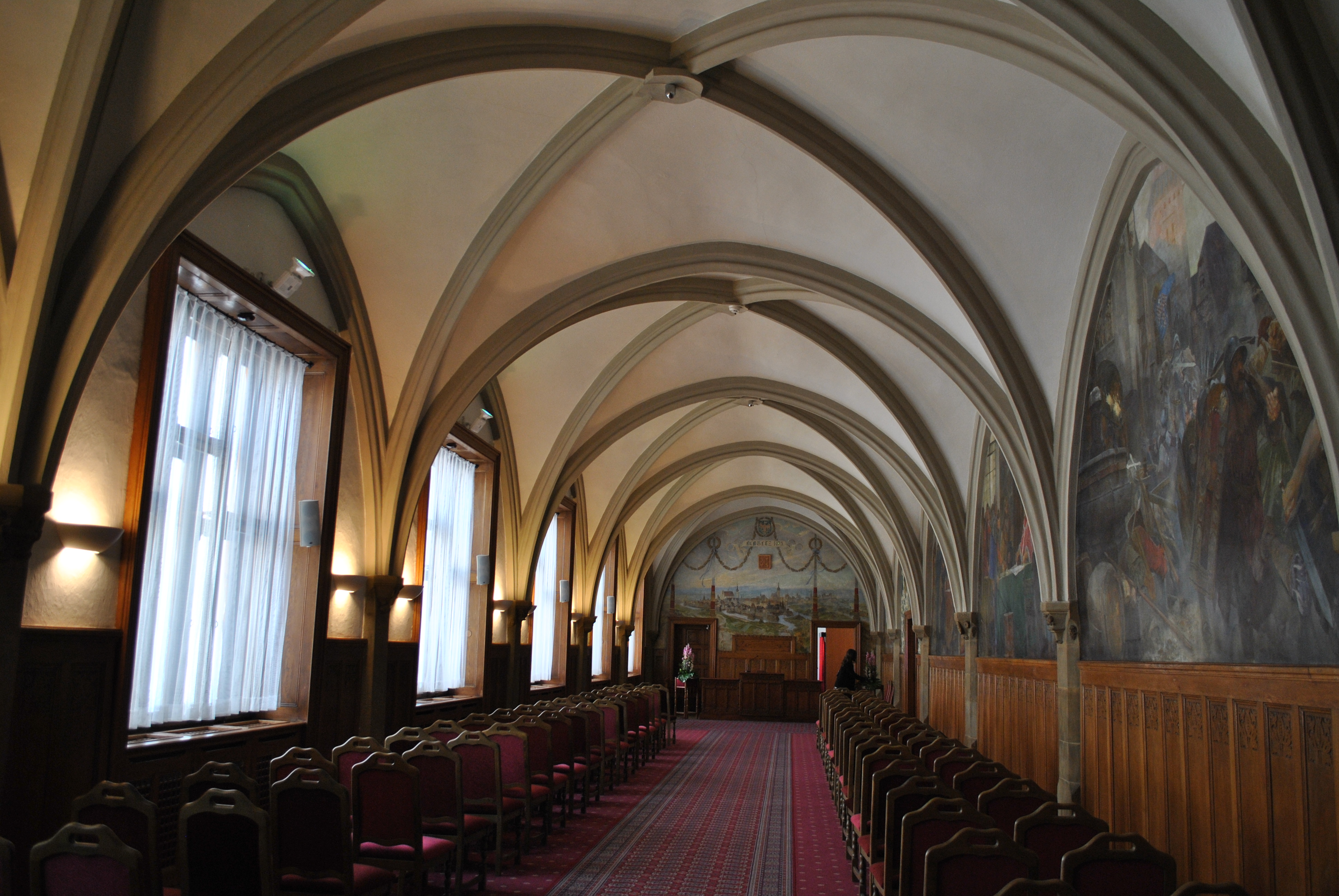 slavnostní sál Olomoucké radnice